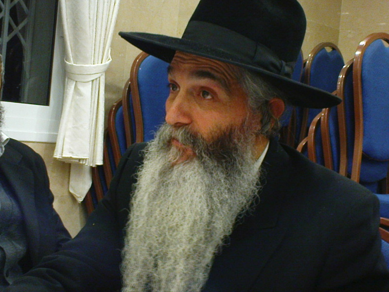 תמונה שצולמה על ידי בסיום מסכת בבית הכנסת של הרב דוד אבוחצירא ( בית כנסת "גואל ישראל")